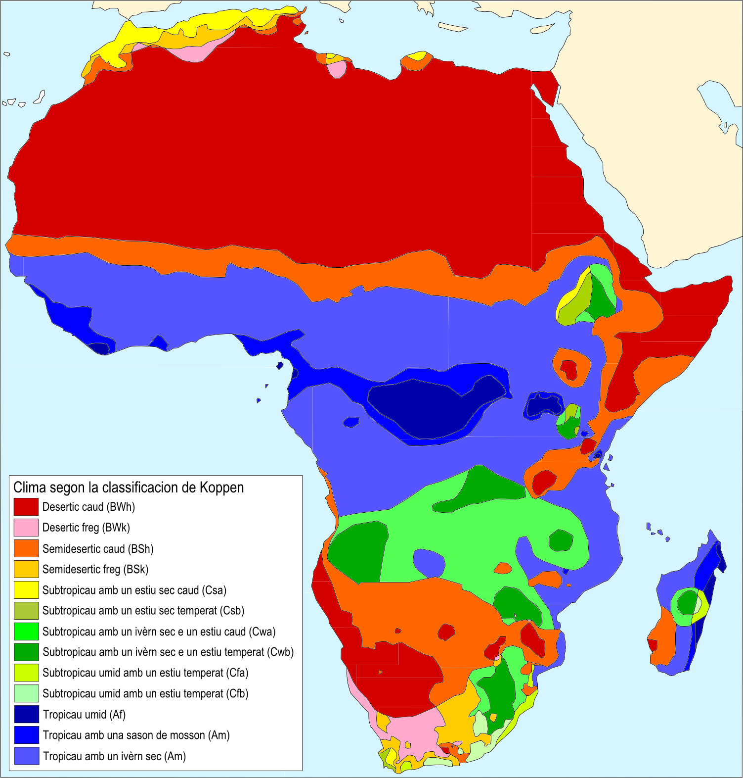 Clima african segon la classificacion de Koppen.